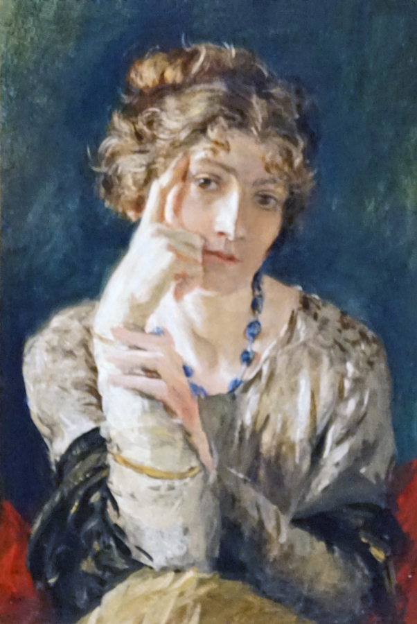 Portrait de Madame Henriette Fortuny par Mariano Fortuny y Madrazo, 1915 Tempera sur carton